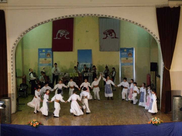 Pokrajinski festival Sombor